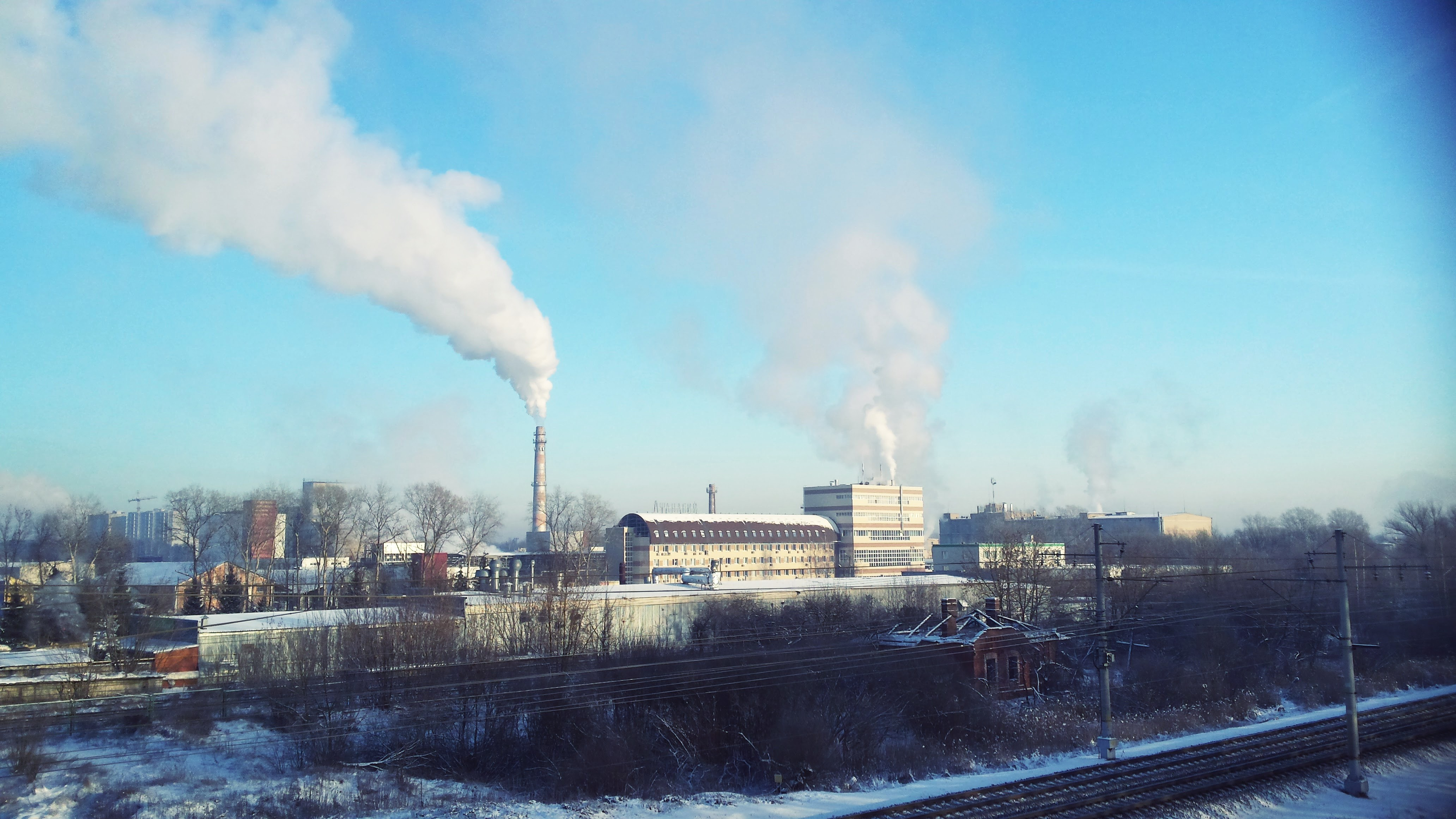 Тверь, Пивоваренный завод Афанасий-пиво